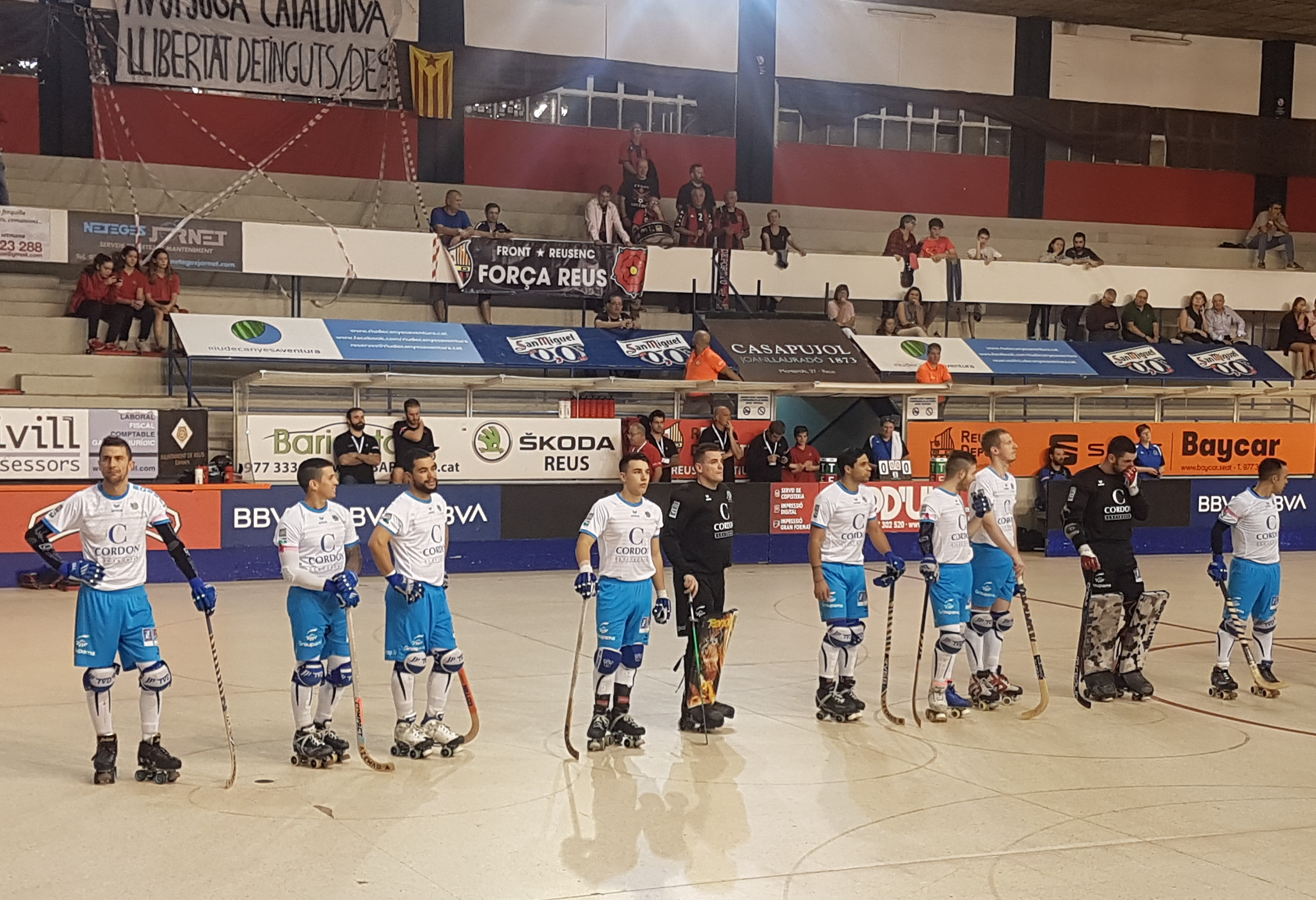 Plantilla Hockey Club Quévertois